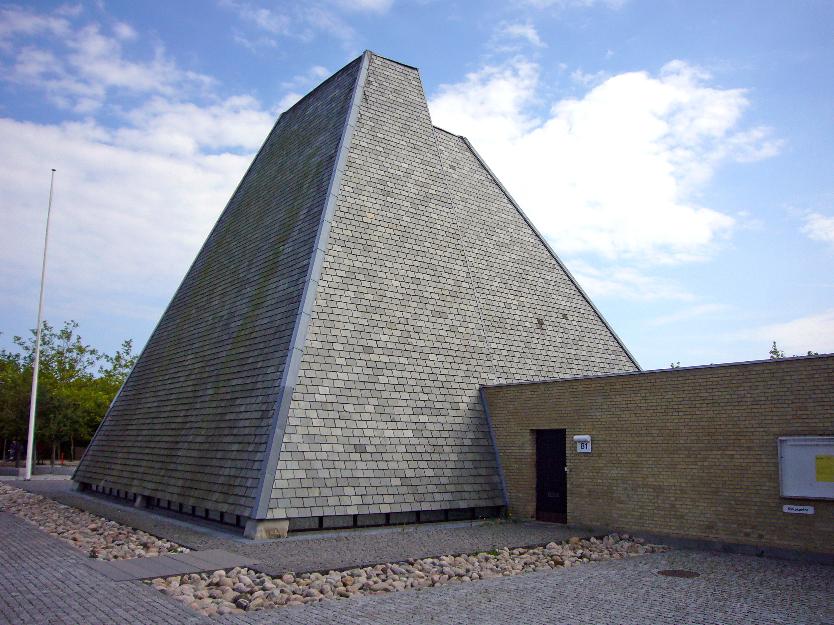 Korsvejskirken, Copenhagen, Denmark. Front